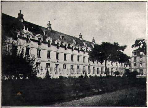 La Maternité, Paris (From the book of Paul Delaunay, La maternité de Paris, Jules Rousset, Paris 1909)